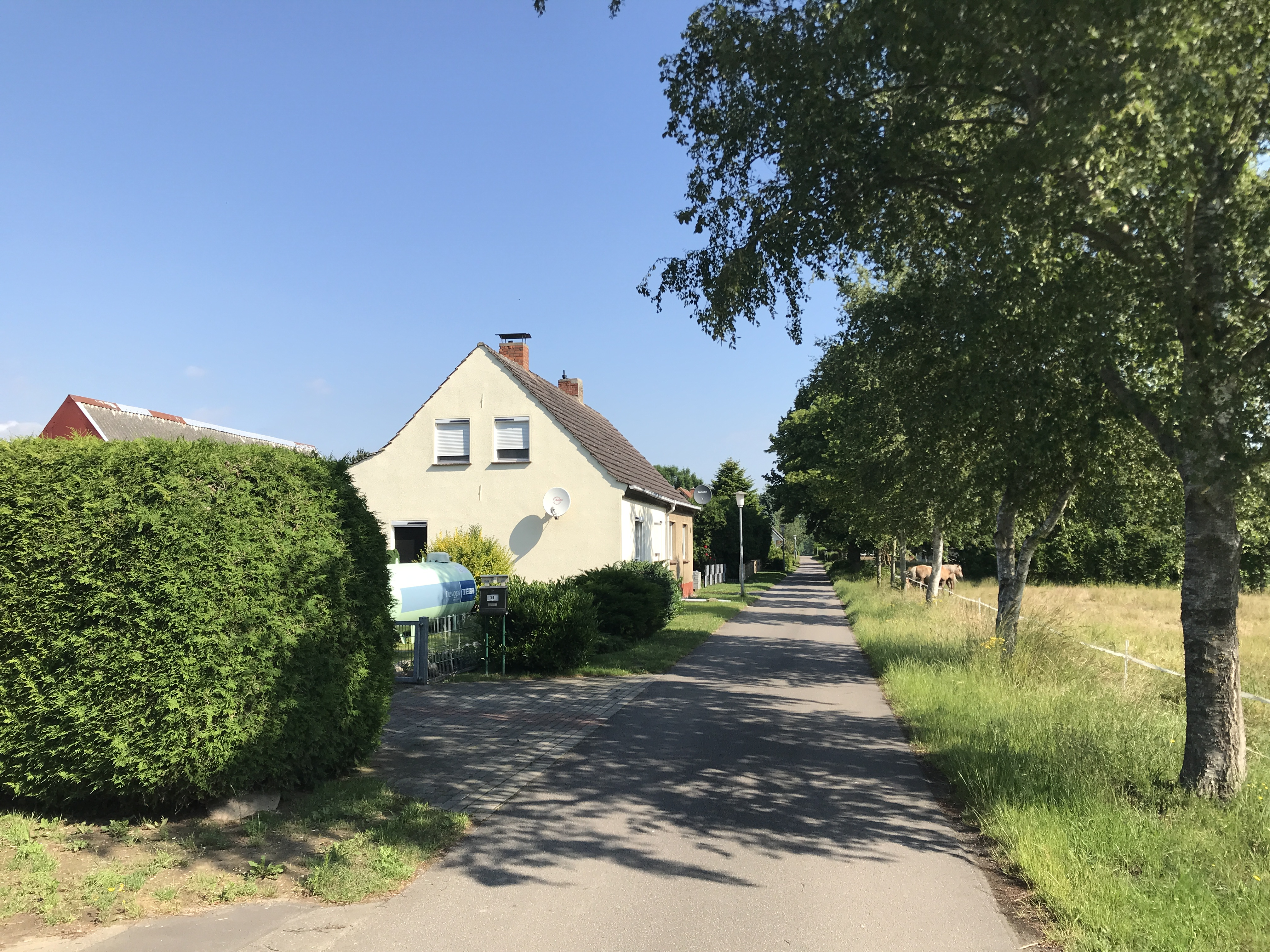 Bassin, ein Ortsteil der Gemeinde Wendisch Baggendorf in Mecklenburg-Vorpommern